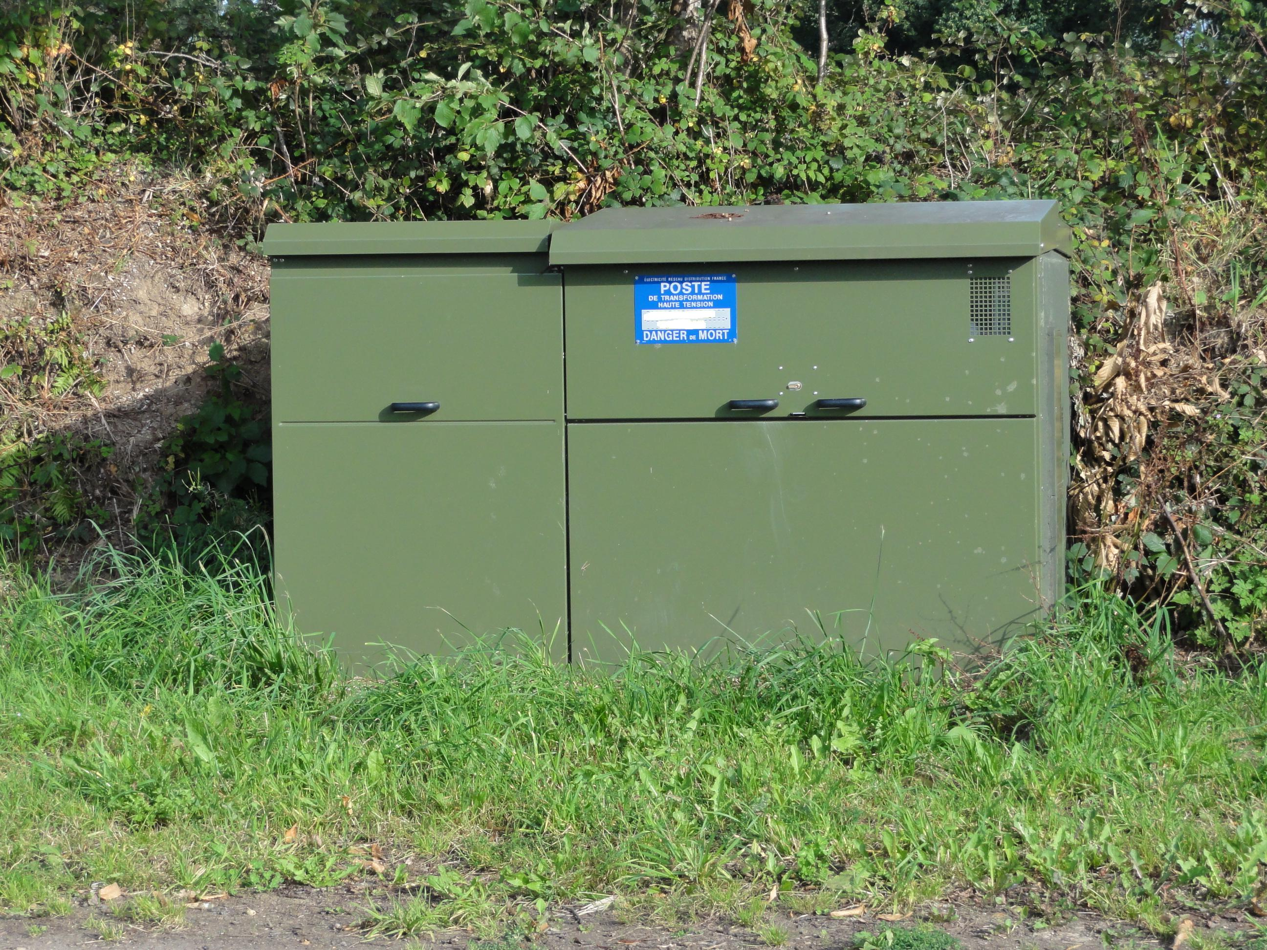 Priziac Tranformateur Haute Tension Enedis (ex-ERDF) au sol